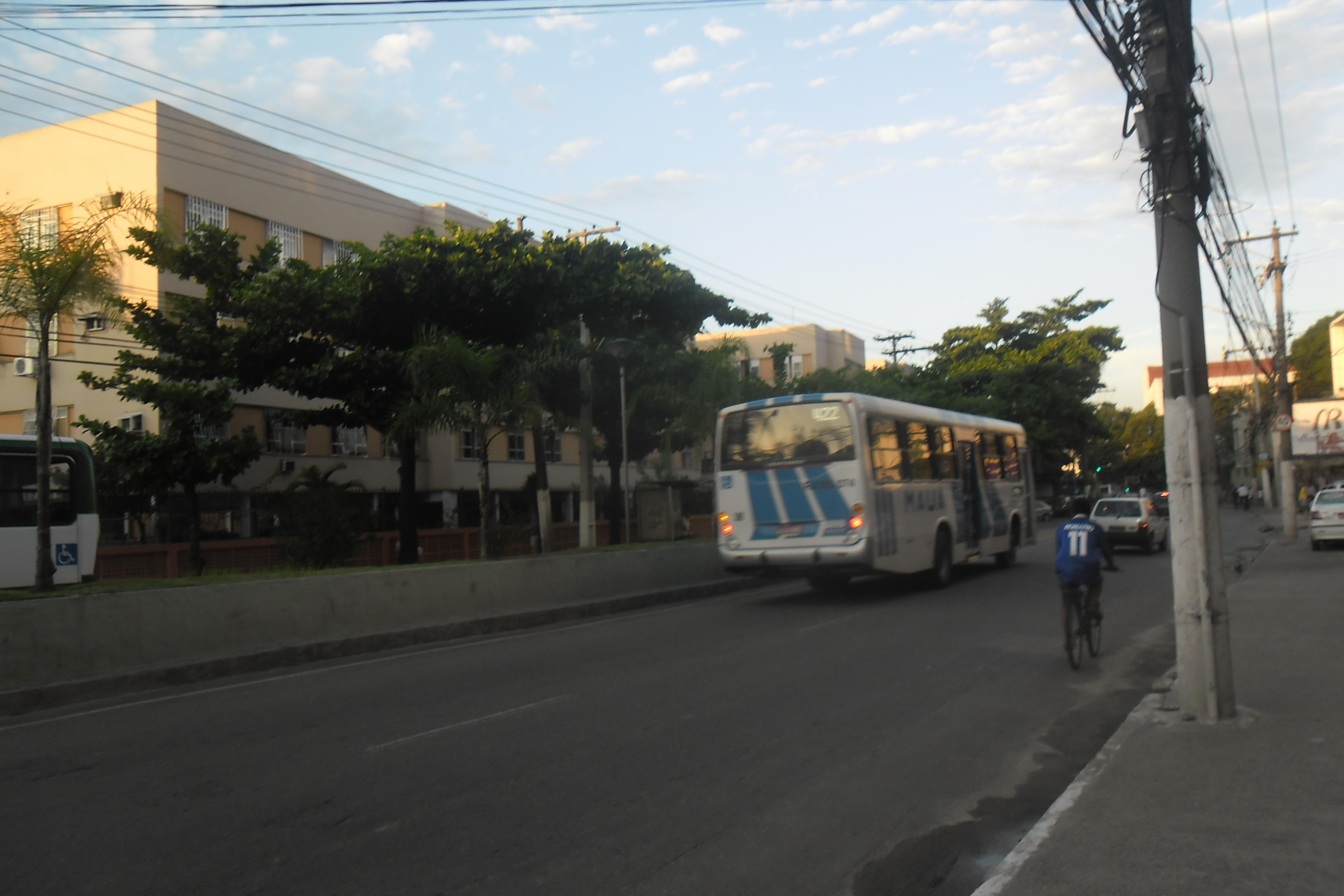 Barreto - Viação Mauá